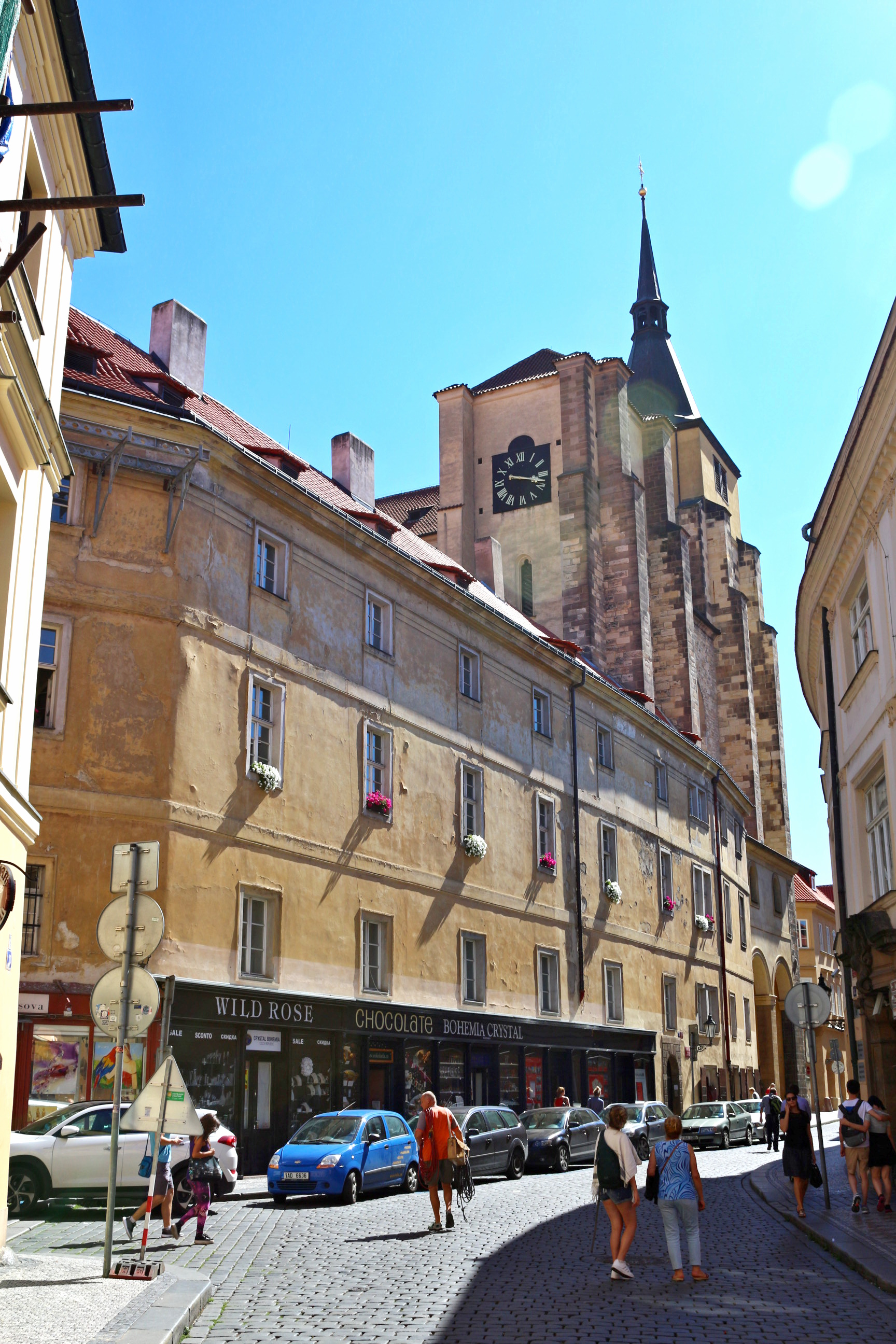 Dominkánský klášter u sv. Jiljí